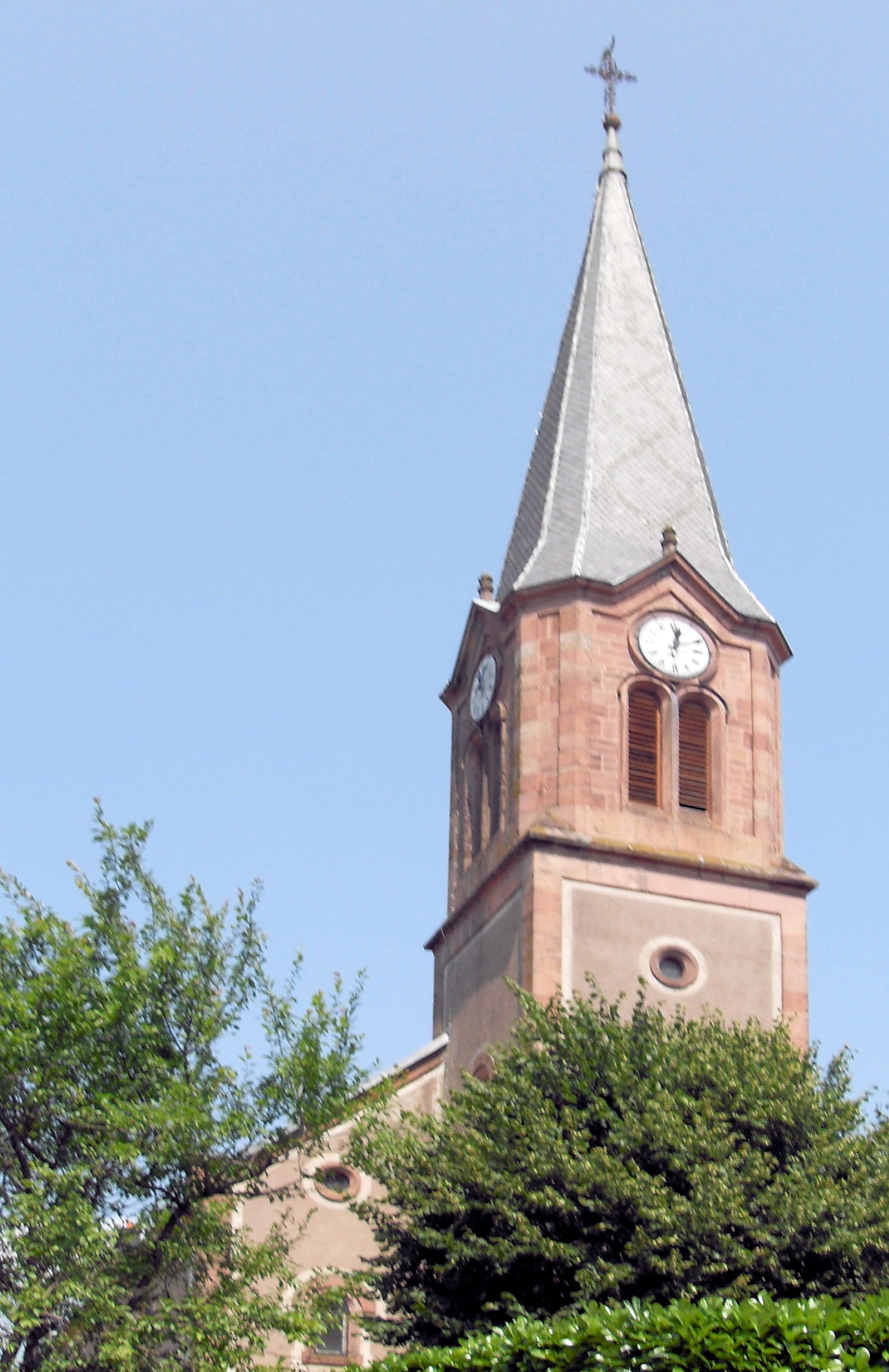 La tour d'église Saint-Dié de Breitenau